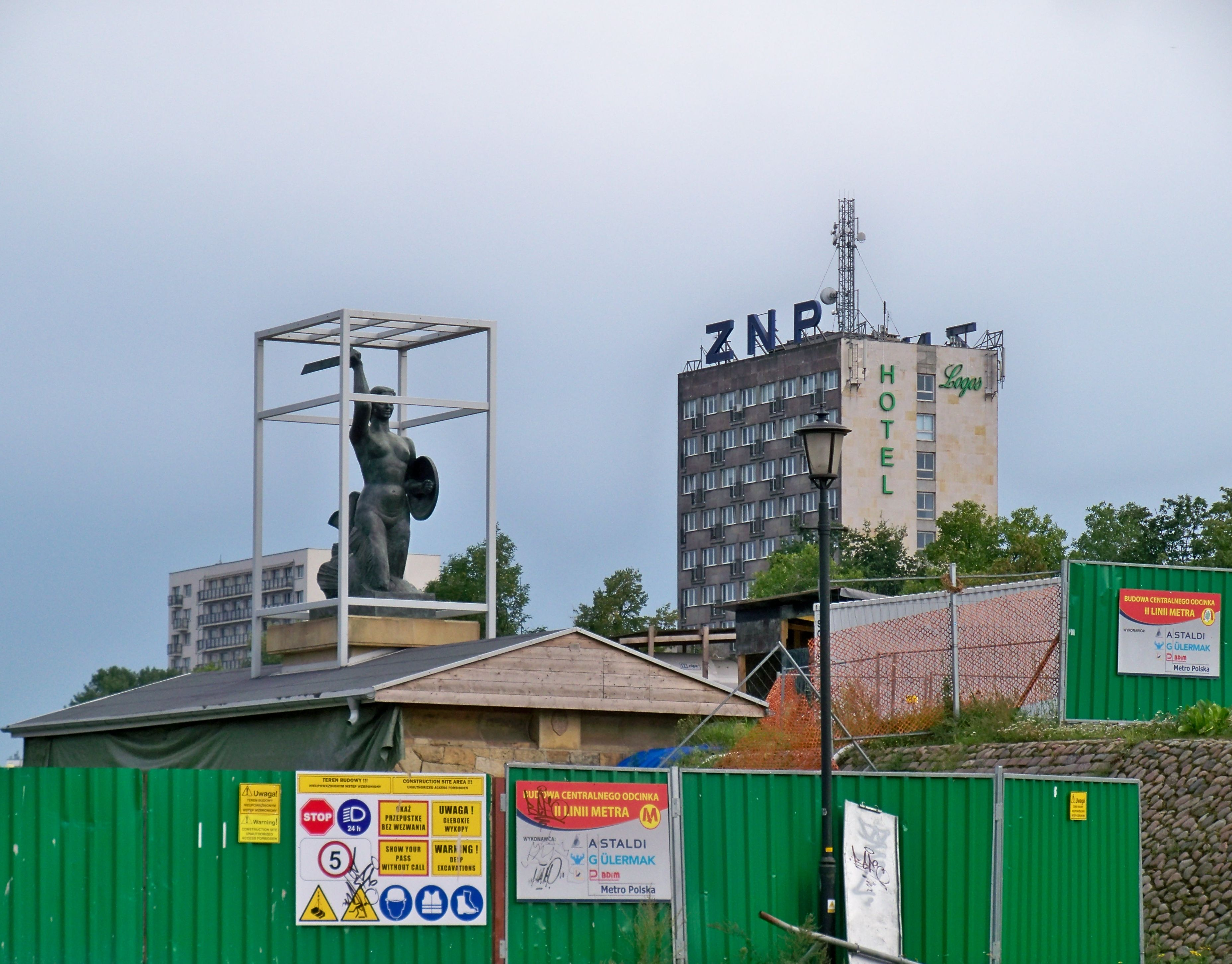 Pomnik Syreny nad Wisłą w Warszawie osłonięty przed pracami przy budowie metra.